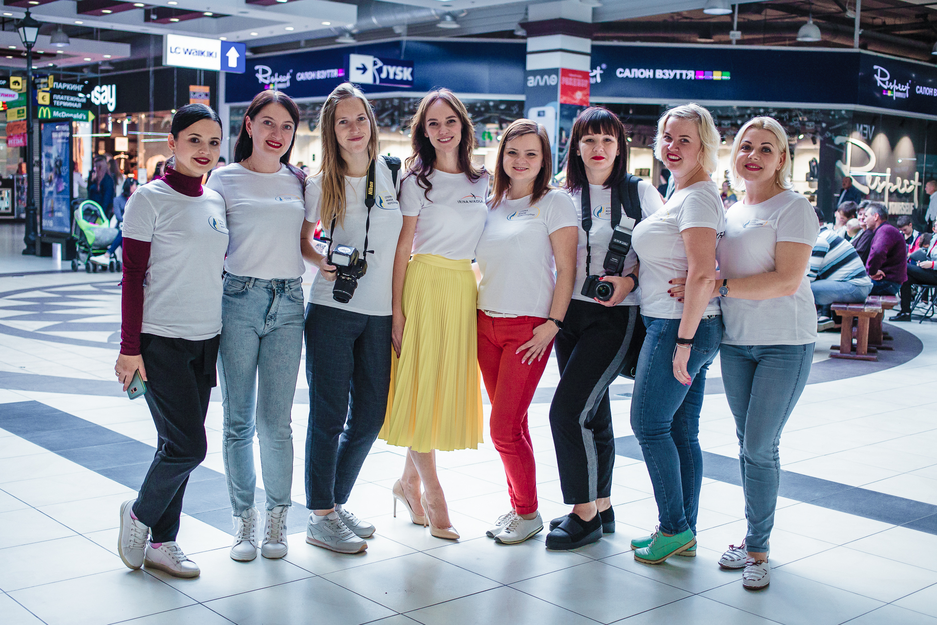 день усиновлення